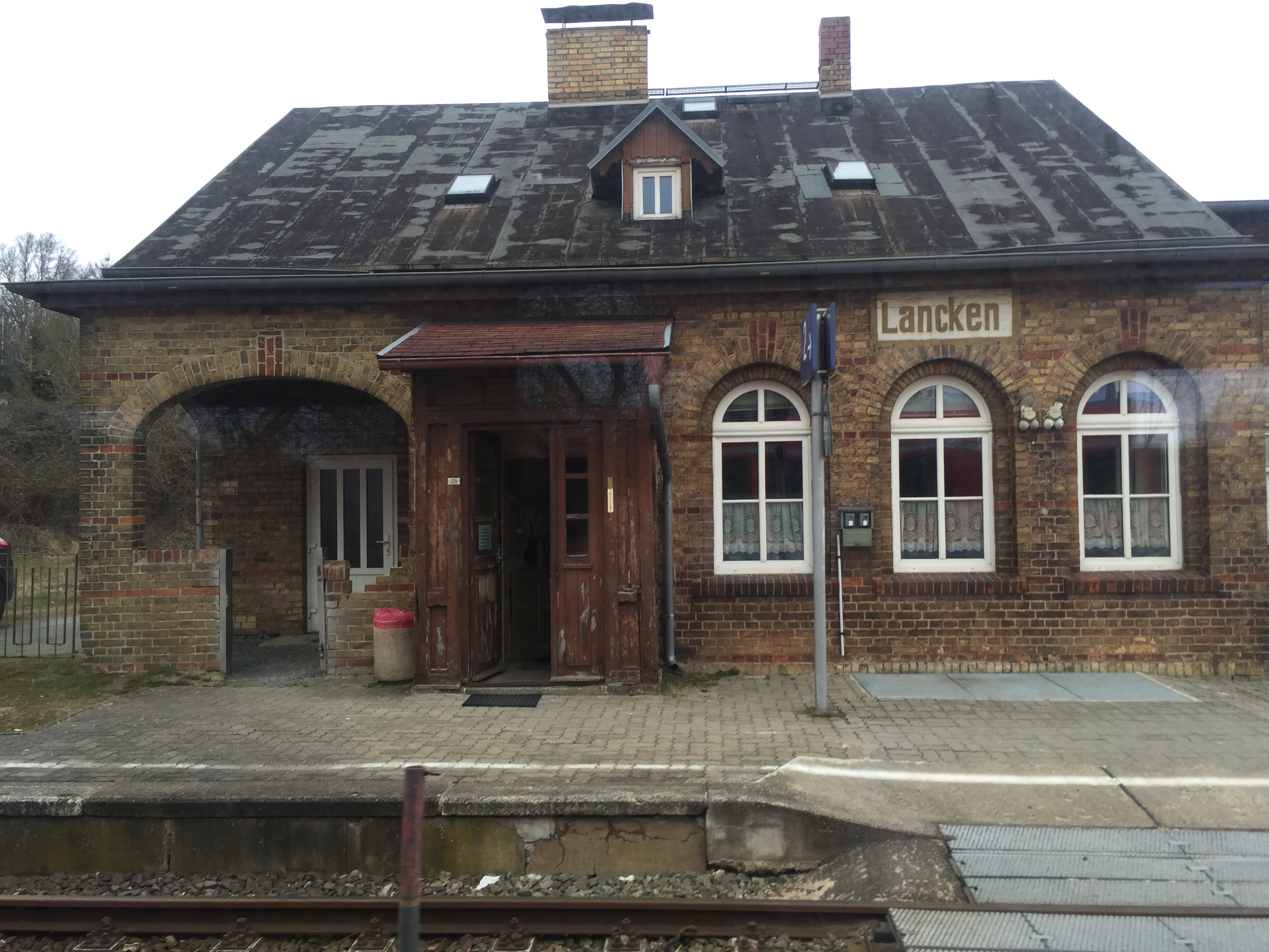 Bahnhof Lancken (Sassnitz)